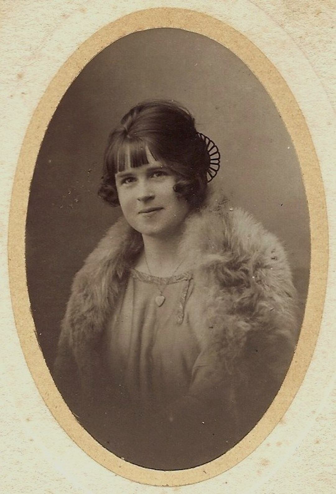 Les années folles. Photographie familiale au cours des années 1920 à Rouen, département de la Seine-Inférieure.